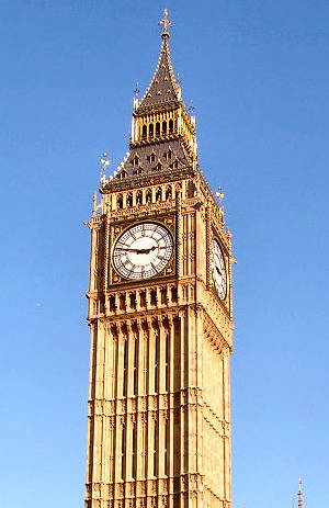 Big Ben, London